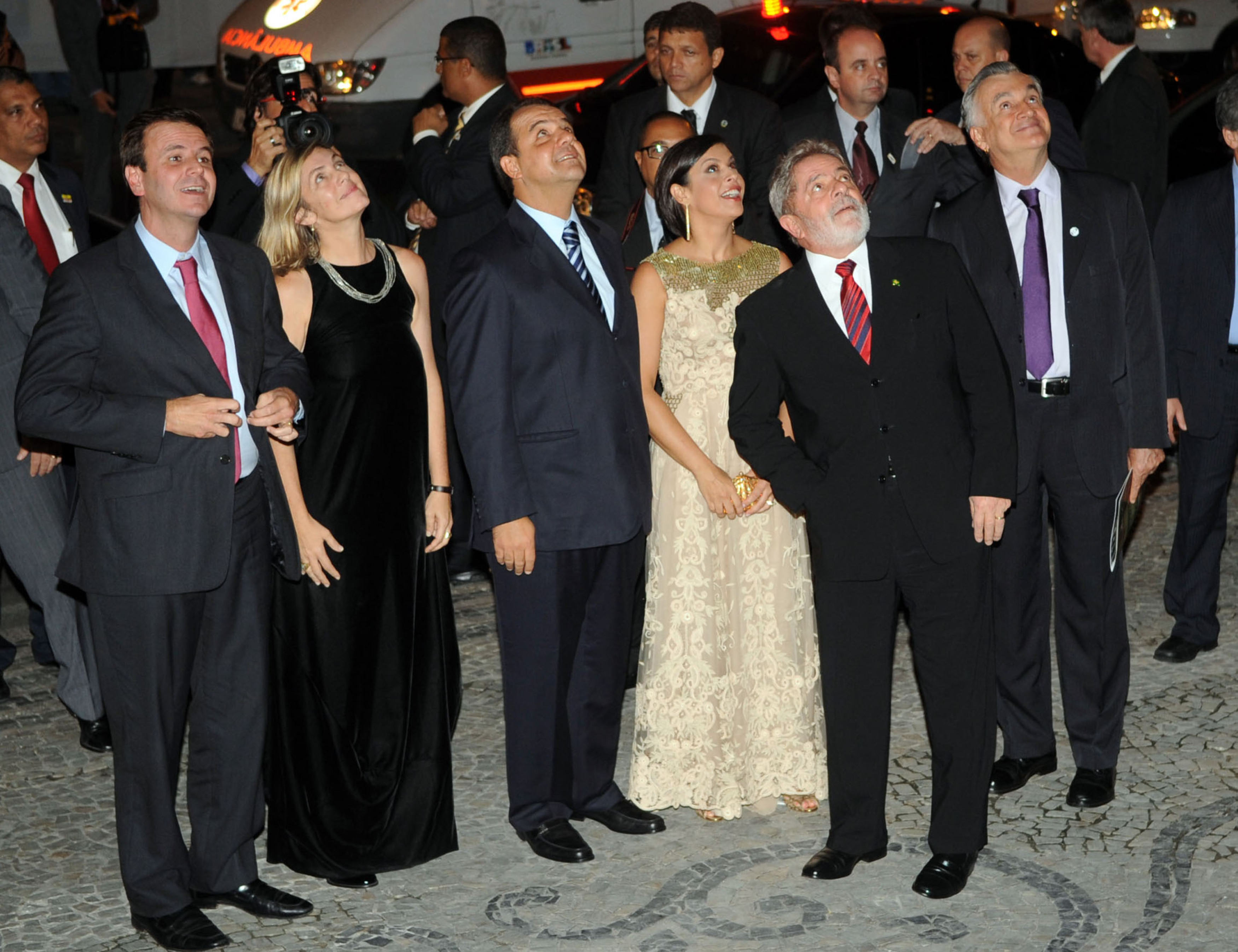 O prefeito da cidade do Rio de Janeiro, Eduardo Paes, a presidente da Fundação Theatro Municipal, Carla Camurati, o governador do Rio de Janeiro, Sérgio Cabral e a primeira-dama, o presidente Luiz Inácio Lula da Silva e o ministro da Cultura, Juca Ferreira, na solenidade de reinauguração do Theatro Municipal do Rio de Janeiro.